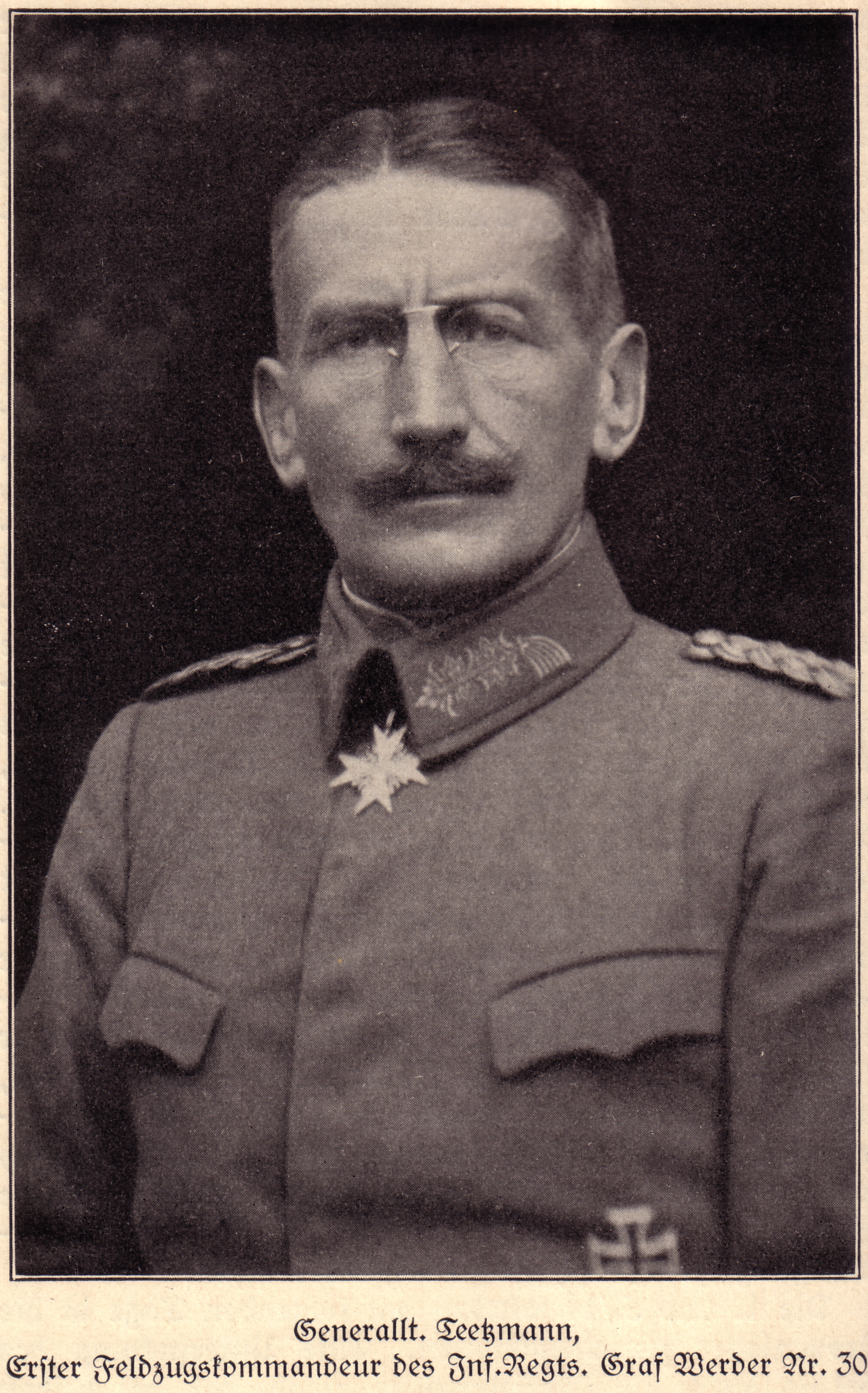 Prussain Lieutenant-General Theodor Teetzmann